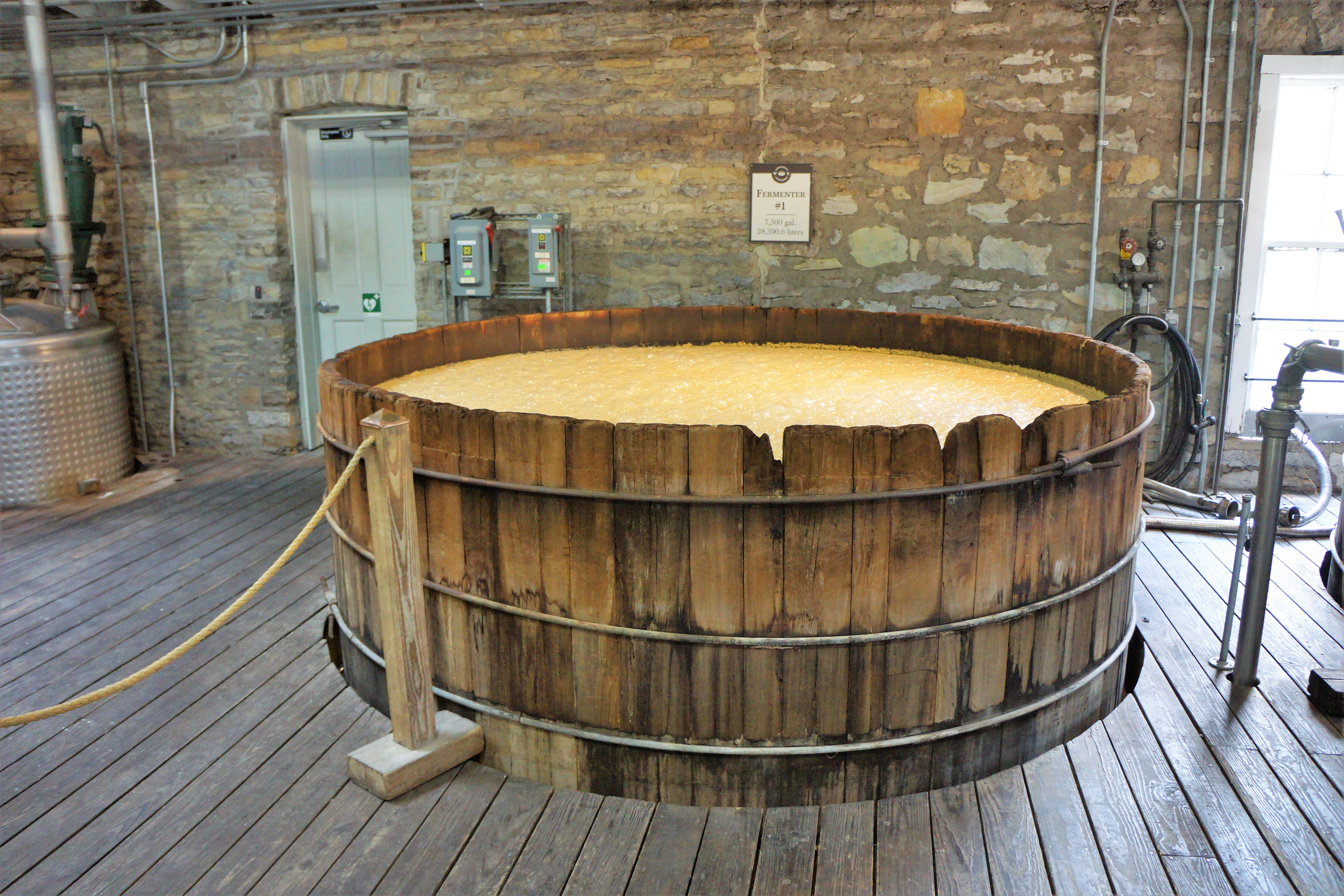 Fermenter #1 at the Woodford Reserve Distillery. Capacity is 7,500 gallons (28,390.6 liters)